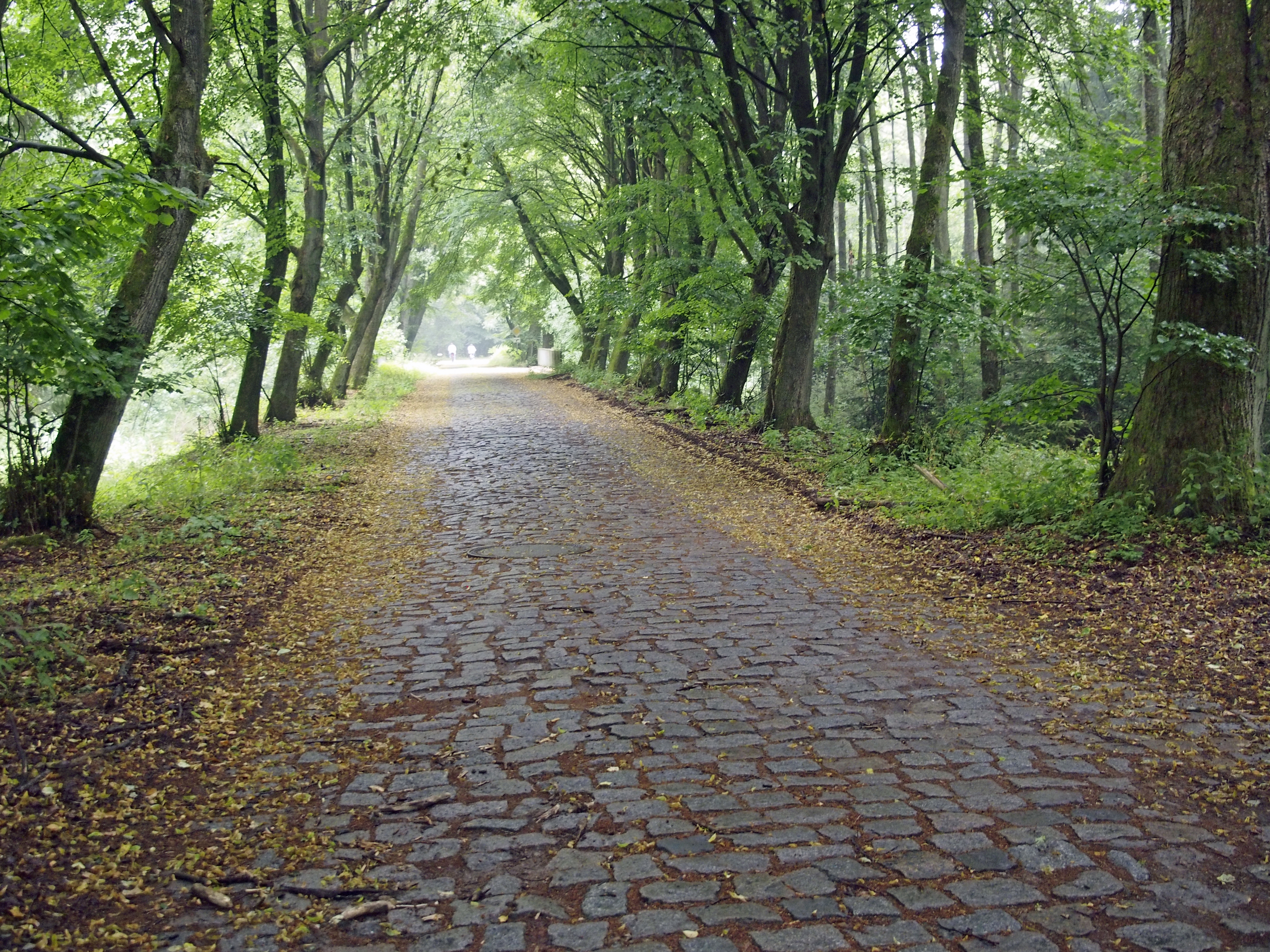 Alte Kopfsteinpflaster-Dorfstraße von ehemals Sültingen (heute Truppeübungsplatz Munster)